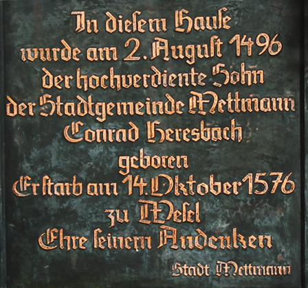 Gedenktafel am Geburtshaus des Conrad Heresbach